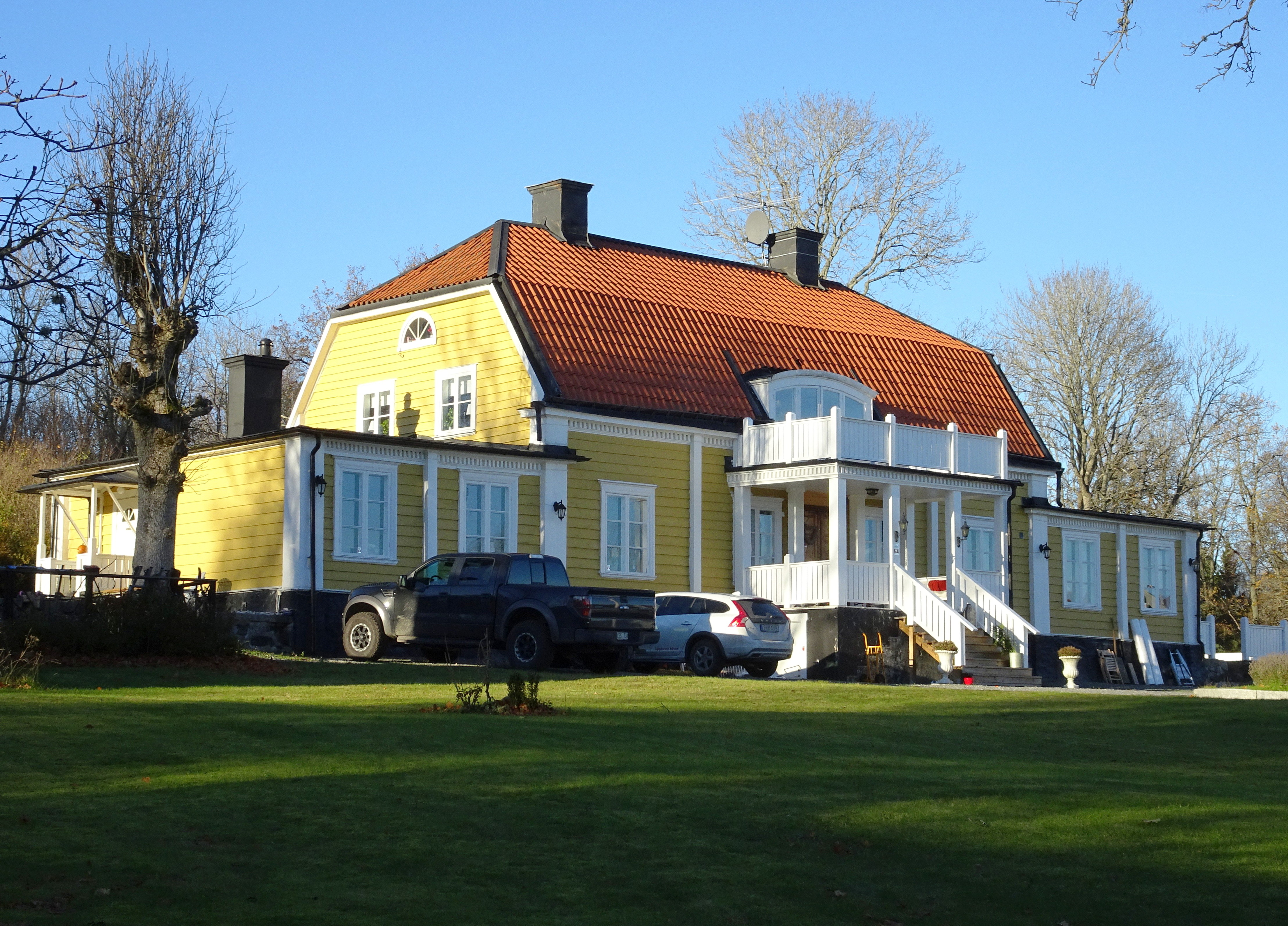 Skogs-Ekeby gård, huvudbyggnad